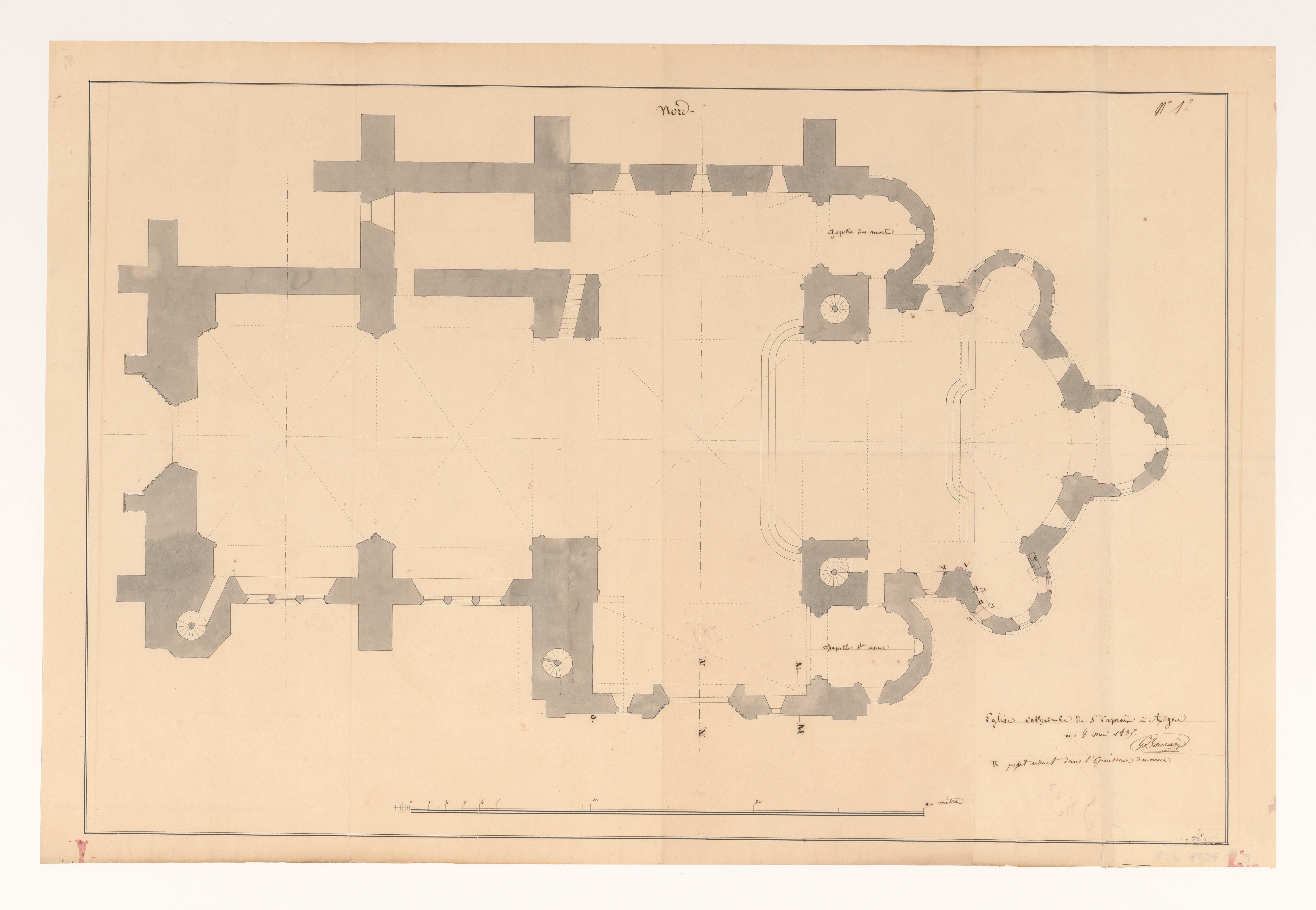 Église cathédrale de S[ain]t-Caprais à Agen. Plan issu des dossiers de travaux de restauration des cathédrales (1802-1912), conservés aux Archives nationales (inventaire et autres documents numérisés consultables en ligne).